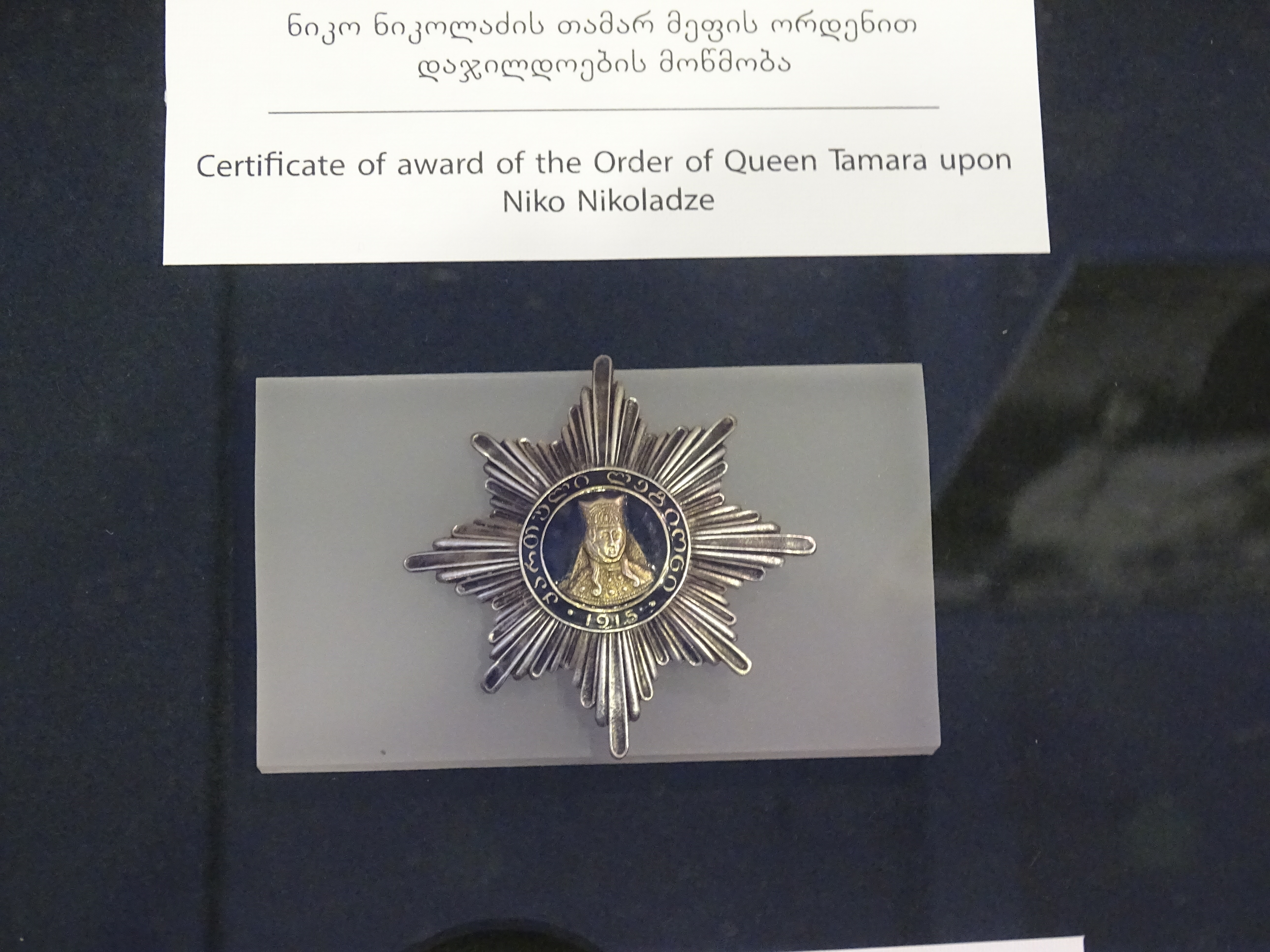 Orden der Königin Tamar, verliehen an Niko Nikoladze. Ausgestellt im Georgischen Nationalmuseum Tiflis